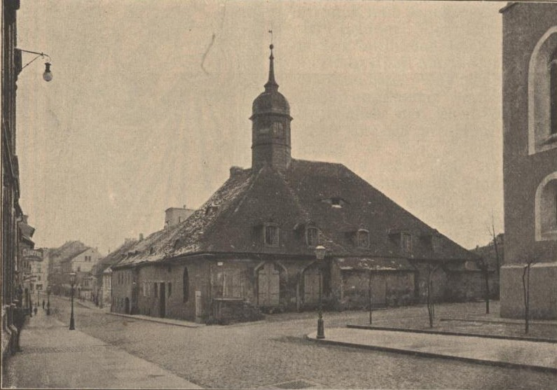 Beiträge zur Sächs. Volks- und Heimatkunde. Mit Zeichnungen von Professor O. Seyffert und Maler F. Rowland.